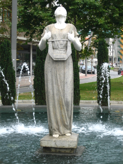 Estatua de Melpómene, obra de Enrique Barros, destinada a sustituir la realizada por Francisco Durrio para el monumento a Arriaga en Bilbao